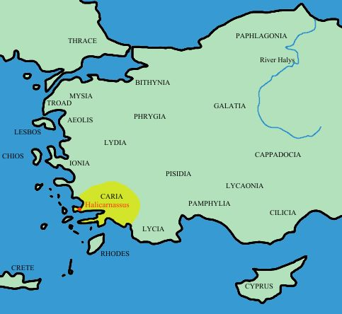 Localización de Caria map of caria, ancient region of modern Turkey. made by me.